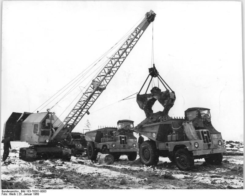 Zentralbild-Weiß we-Qu. 25.1.1960 Die ersten Öltanks werden 1960 in Schwedt errichtet. Die ersten neun großen Öltanks werden in diesem Jahr auf dem Gelände des künftigen Erdölverarbeitungswerkes bei Schwedt an der Oder errichtet. Es handelt sich dabei um zwölf Meter hohe Dieselöl- und Heizöltanks, die mit ihrem Durchmesser von 22 Metern 5 000 Kubikmeter fassen. Die Tanks werden vom VED GAselan in Fürstenwalde (Spree) geliefert. (Siehe auch ADN-Meldung 560 und 561 v. 24.1.60) UBz. Planierungsarbeiten auf dem Gelände des künftigen Erdölverarbeitungswerkes.